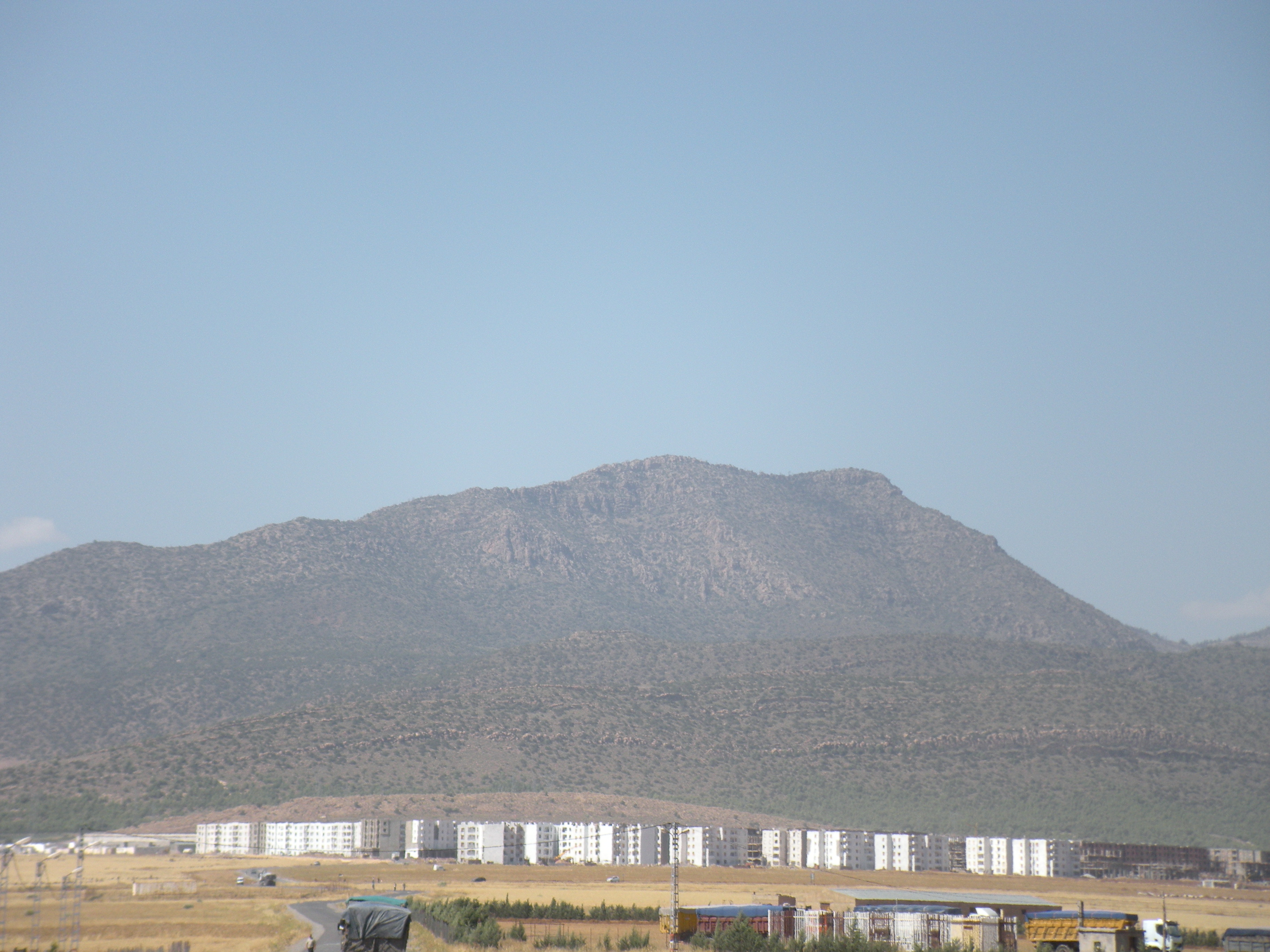 Parc du Belezma, un sommet dans le massif du Belezma à l'entrée du parc